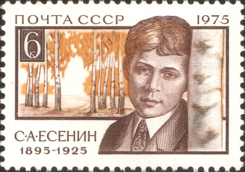 Briefmarke, Sowjetunion